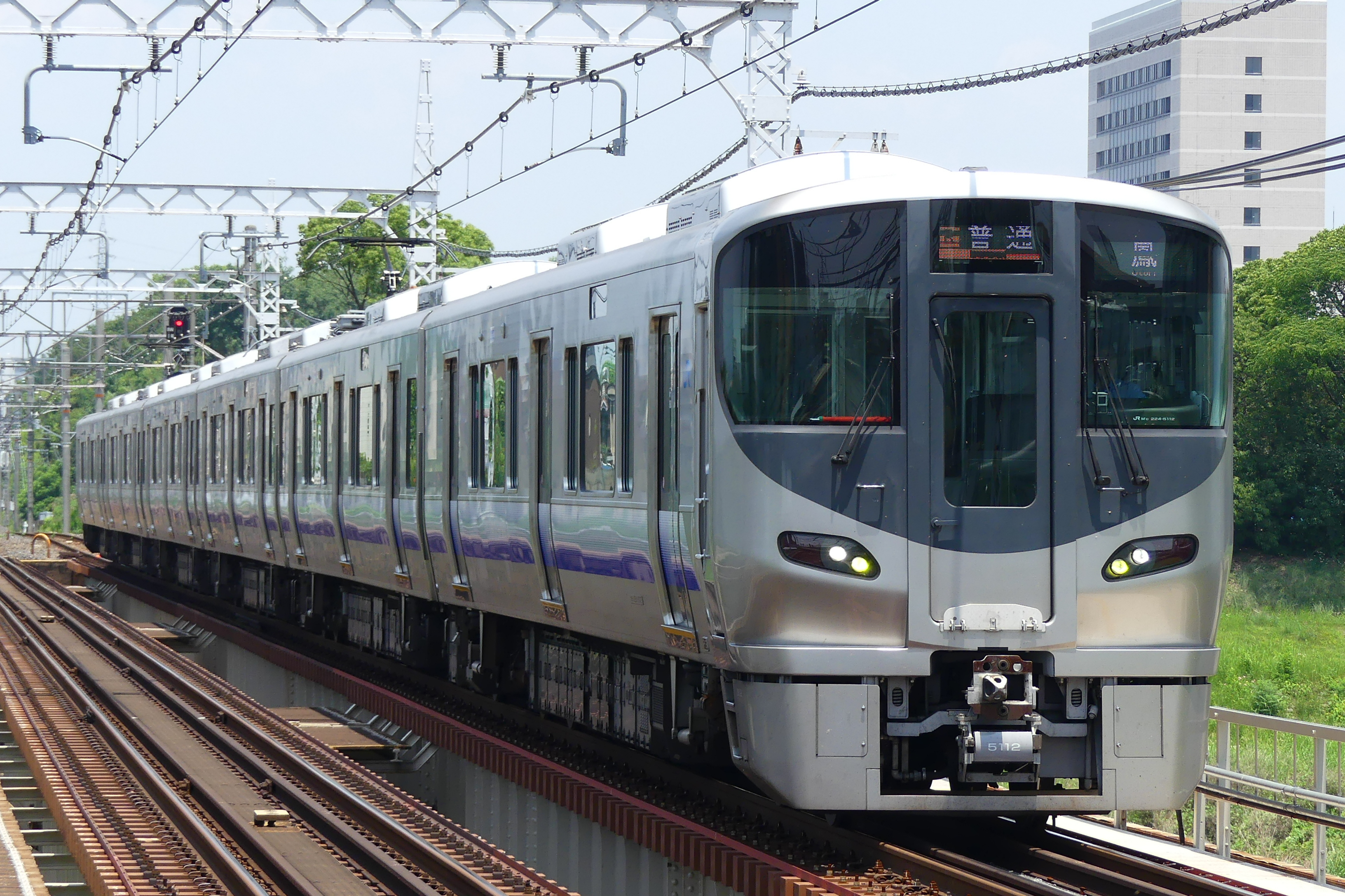 阪和線225系5100番台電車